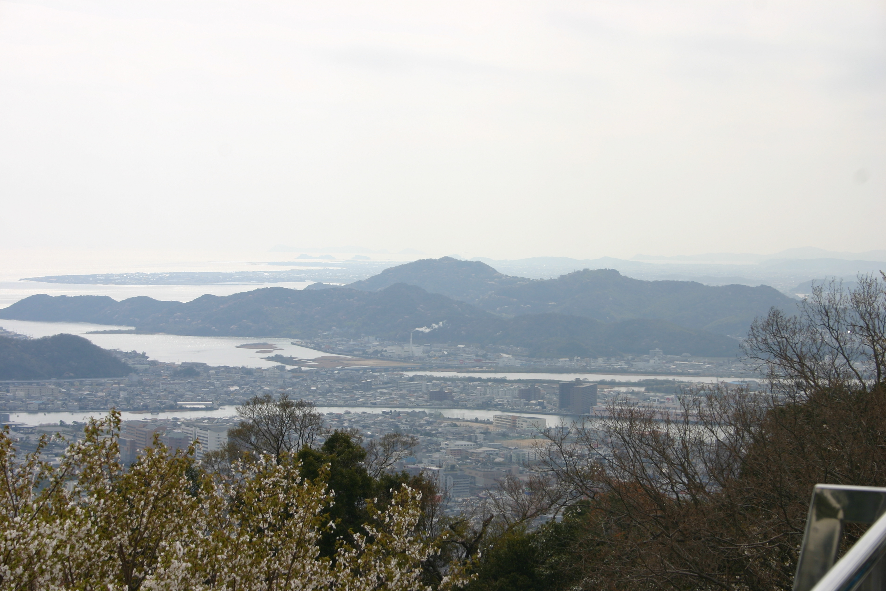 眉山からみた日峰山